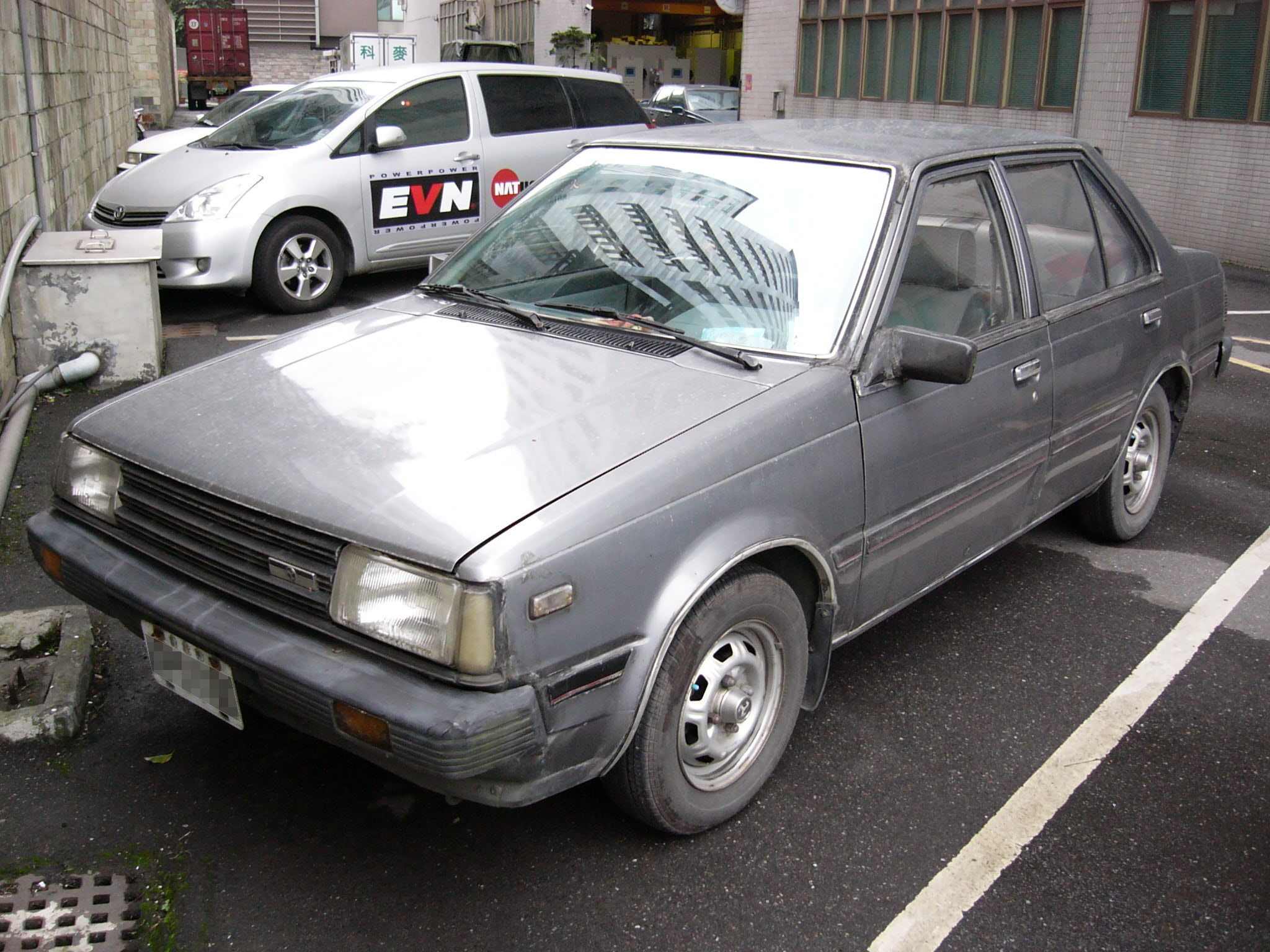 裕隆速利（Sunny）1.3DX左前方外觀1